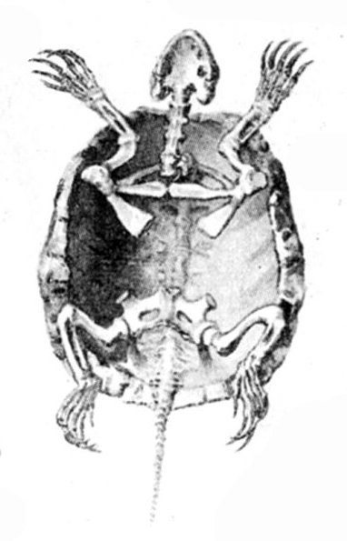 Skelett von der europ. Sumpfschildkröte